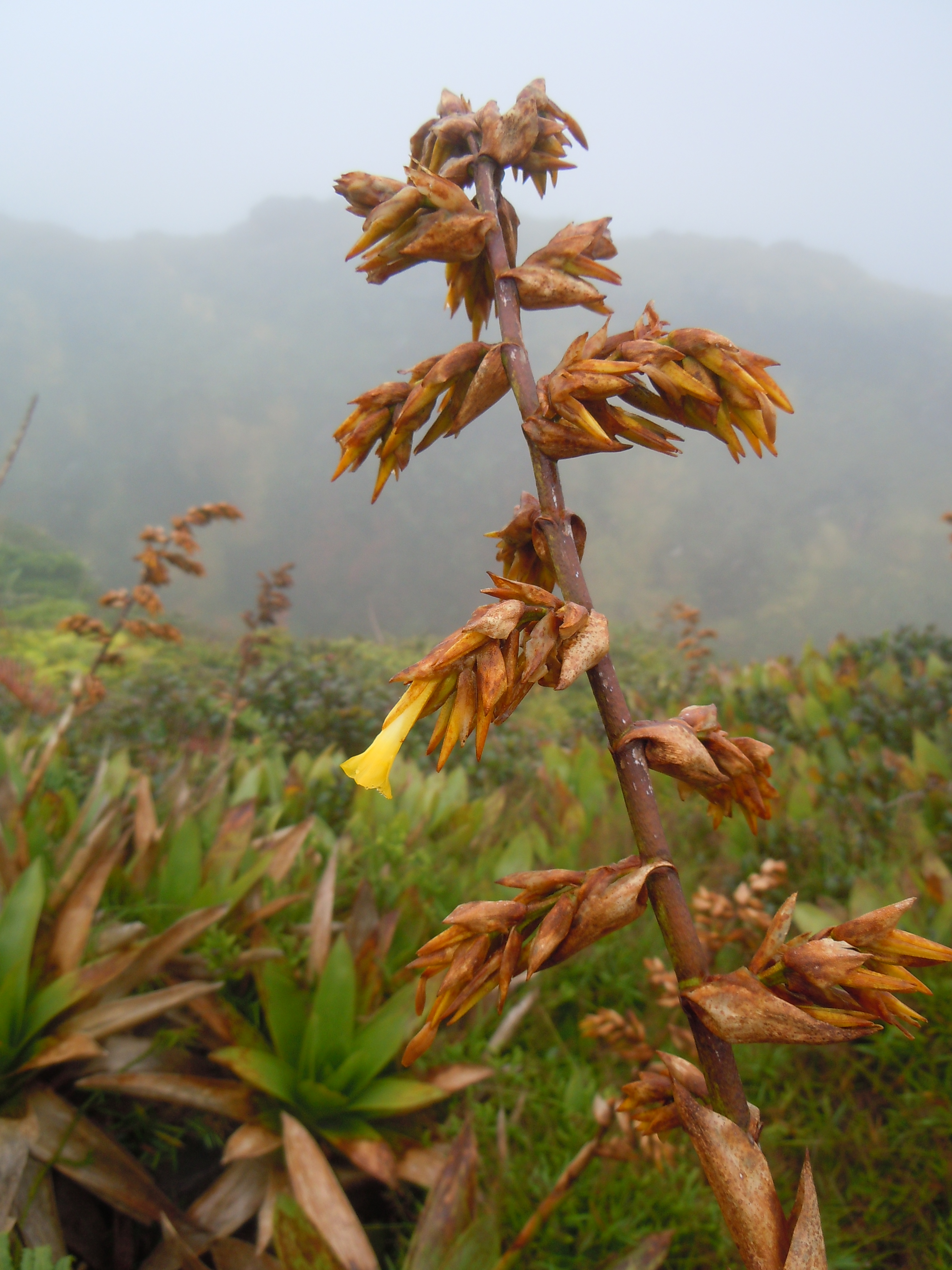 Guzmania plumieri, inflorescence